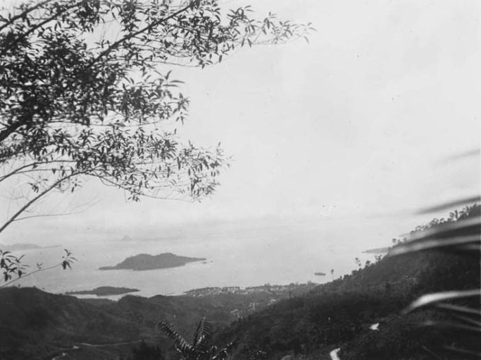 Foto. Sibolga, residentie Tapanoeli, Sumatra